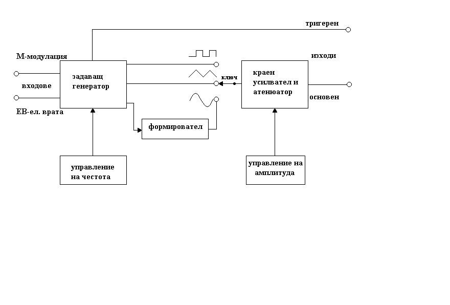 Блокова схема на функционален генератор